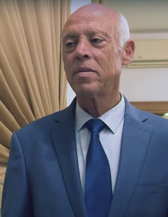 صورة ملتقطة للقاء قيس سعيد مع نواة (موقع اخباري) والفديو ذو حقوق من نوع Creative Commons Attribution license (reuse allowed)